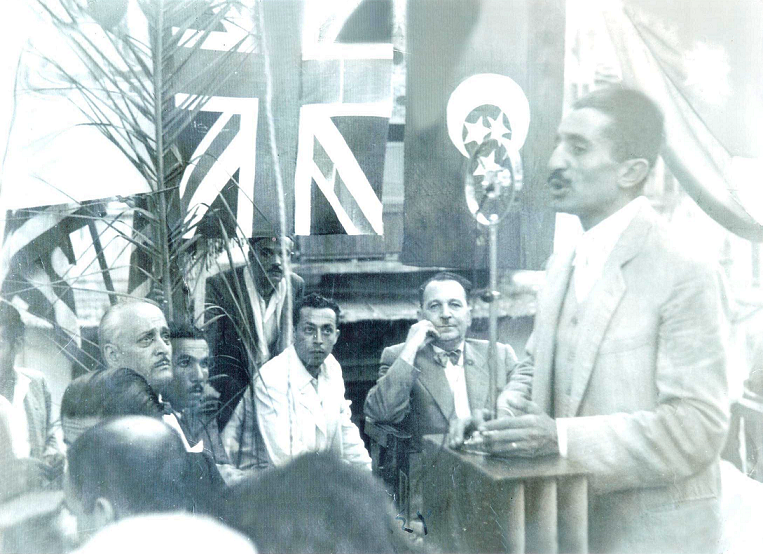 عبد الرحمن الكوشFrançais cadien: Abderrahman El Kouch